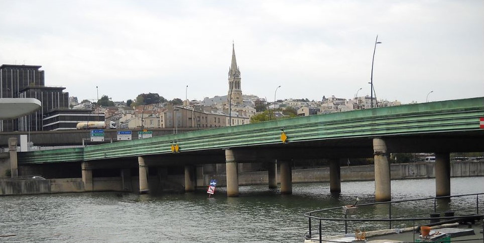 Vue du pont de Saint-Cloud avec en arrière plan la ville de Saint-Cloud